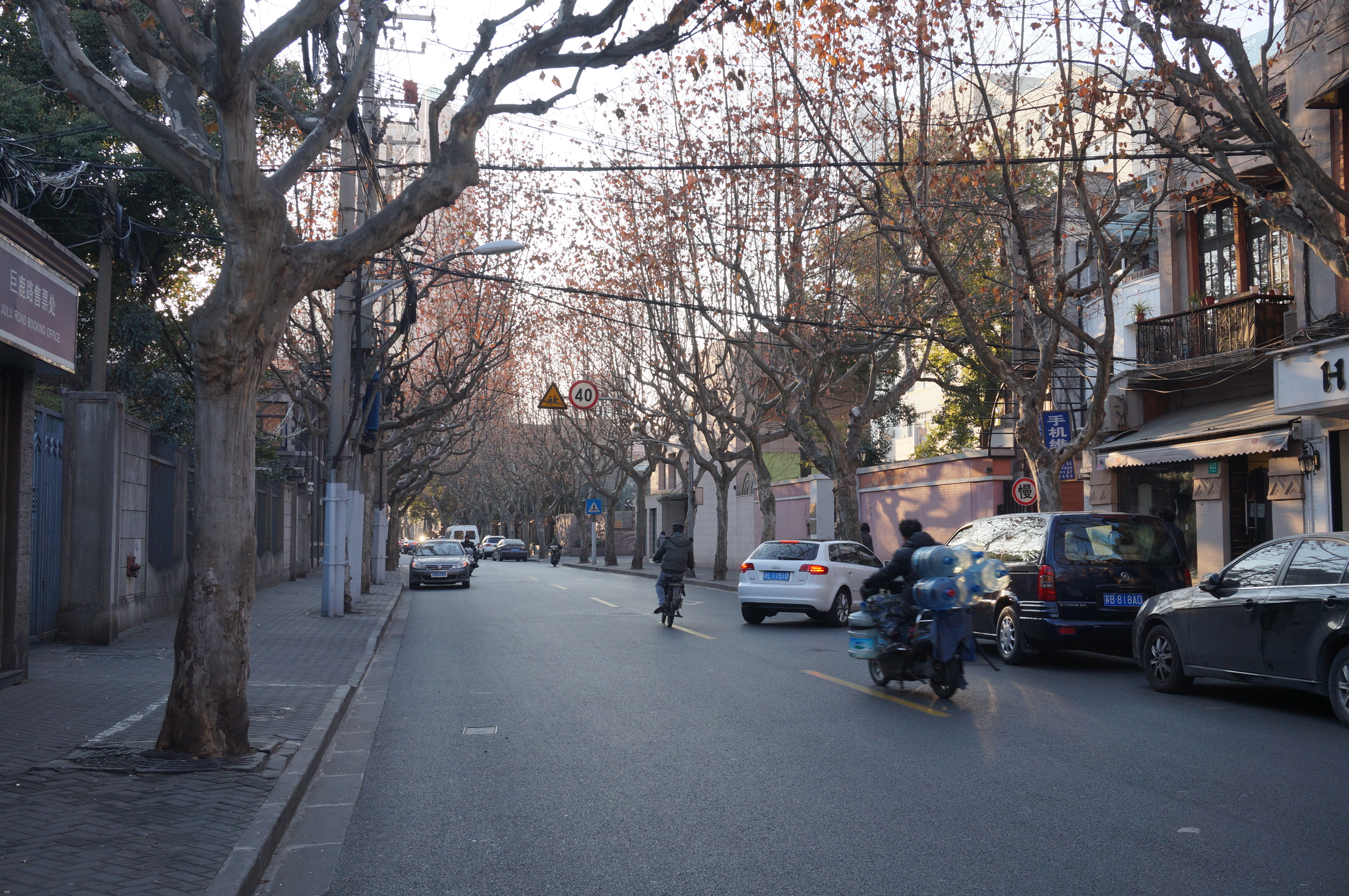 巨鹿路襄阳北路以西街景